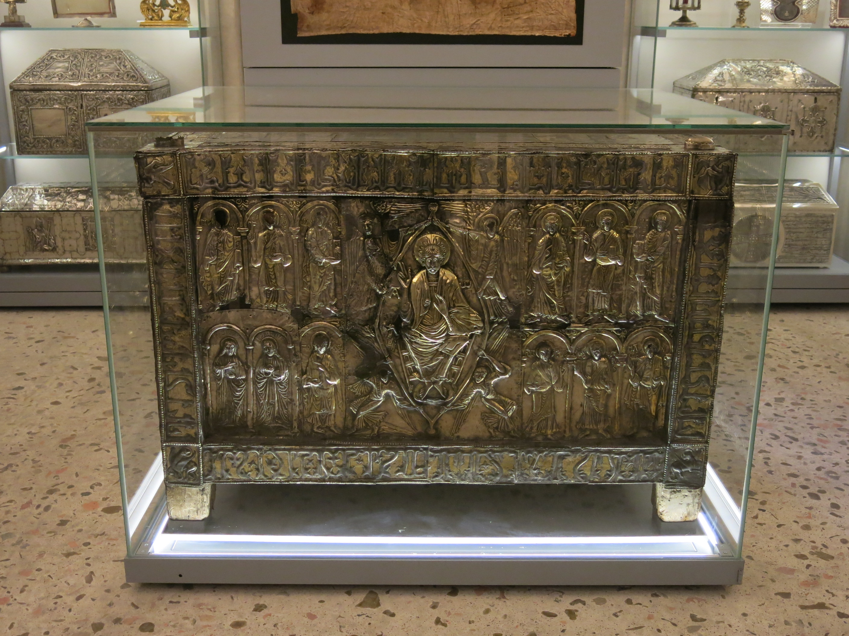 Catedral de San Salvador